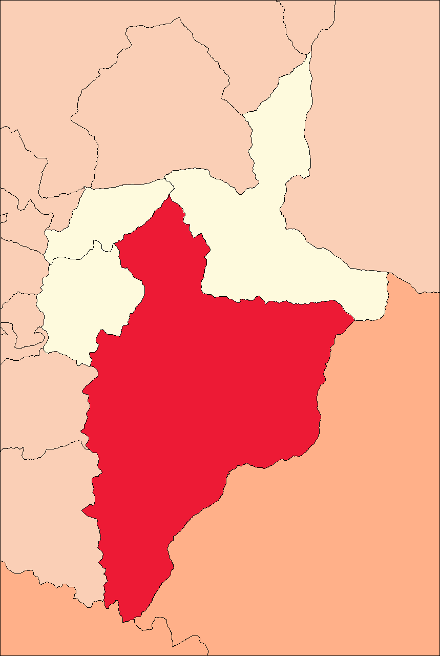 Área del distrito de Panao.